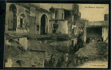 הריסות במלאח של פאס לאחר הפרעות של שנת 1912